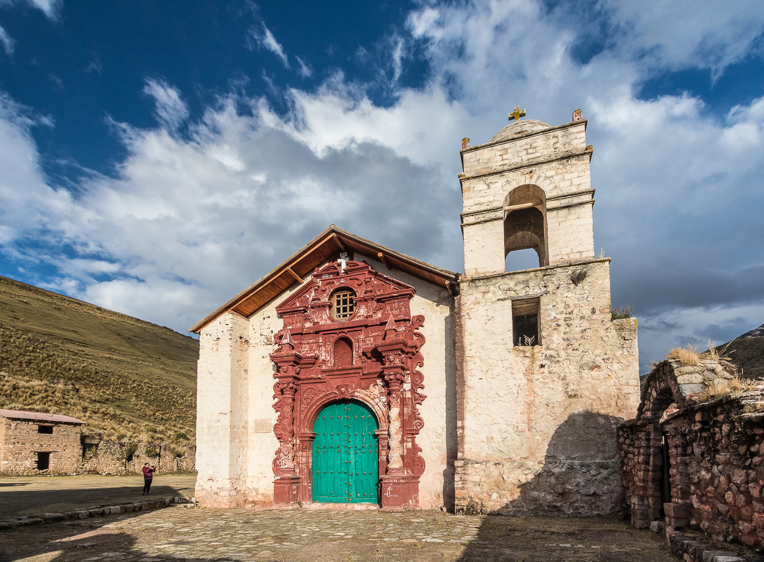 La iglesia Santa Barbara se encuentra en el pueblo del mismo nombre, actualmente es un lugar abandonado.